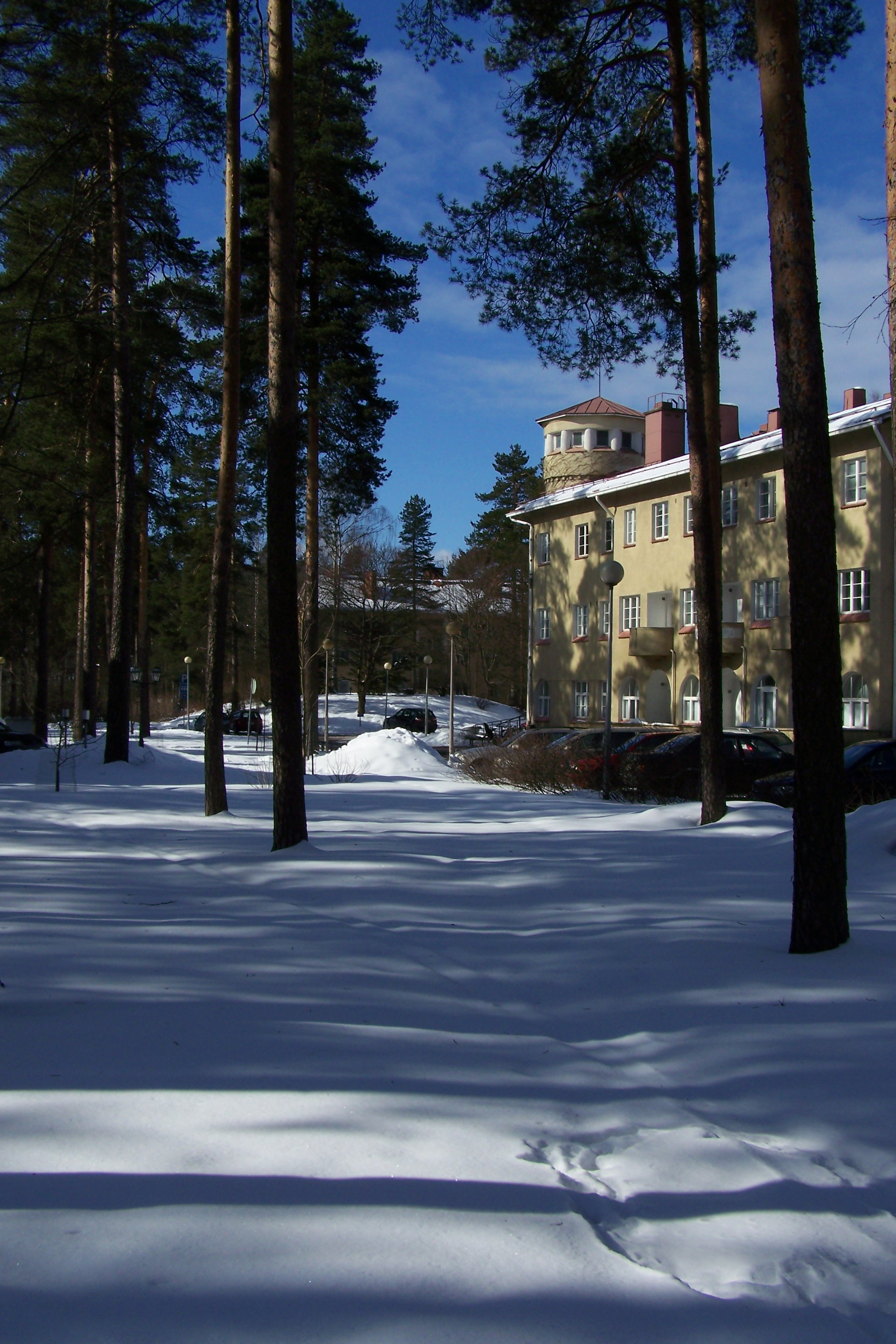 Arkkitehti Lars Sonckin vuonna 1906 suunnittelema parantolarakennus Hyvinkäällä.